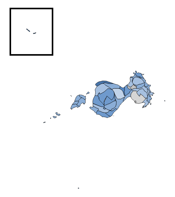 中文（台灣）: 灰色村里為陳福海領先的村里 顏色對照表